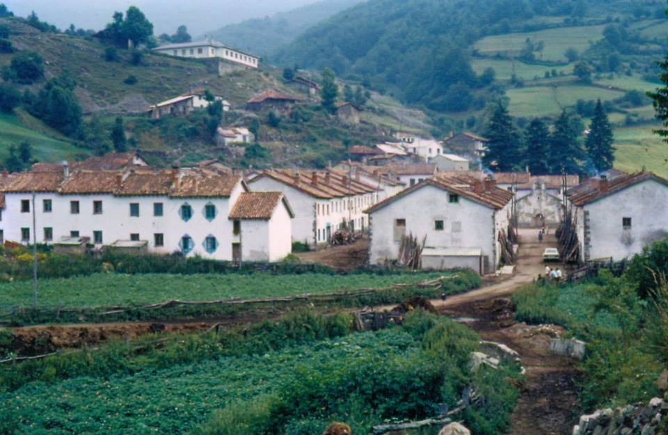 Vista del pueblo de Tarna, Asturias.